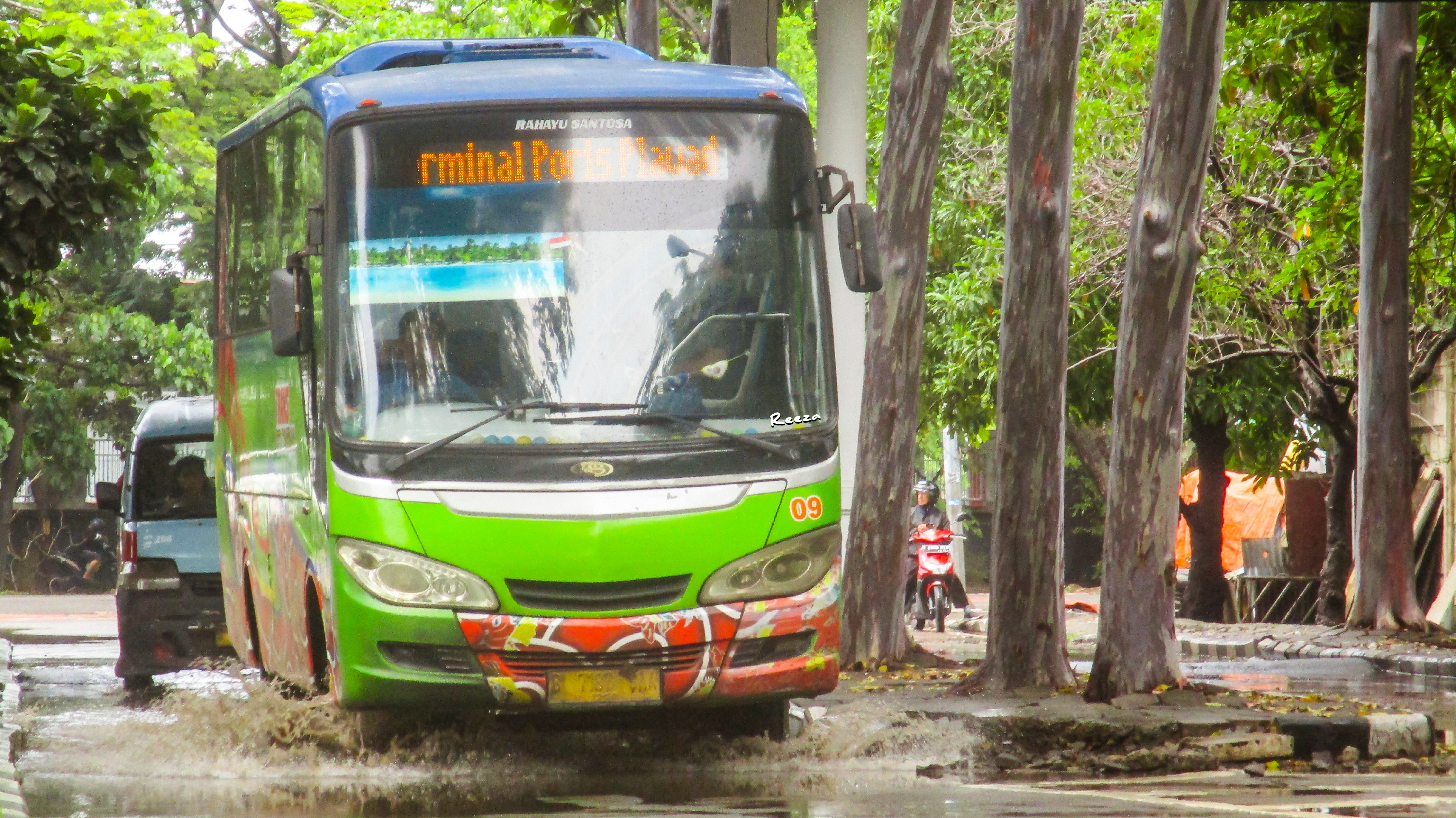 Salah satu armada Trans Kota Tangerang